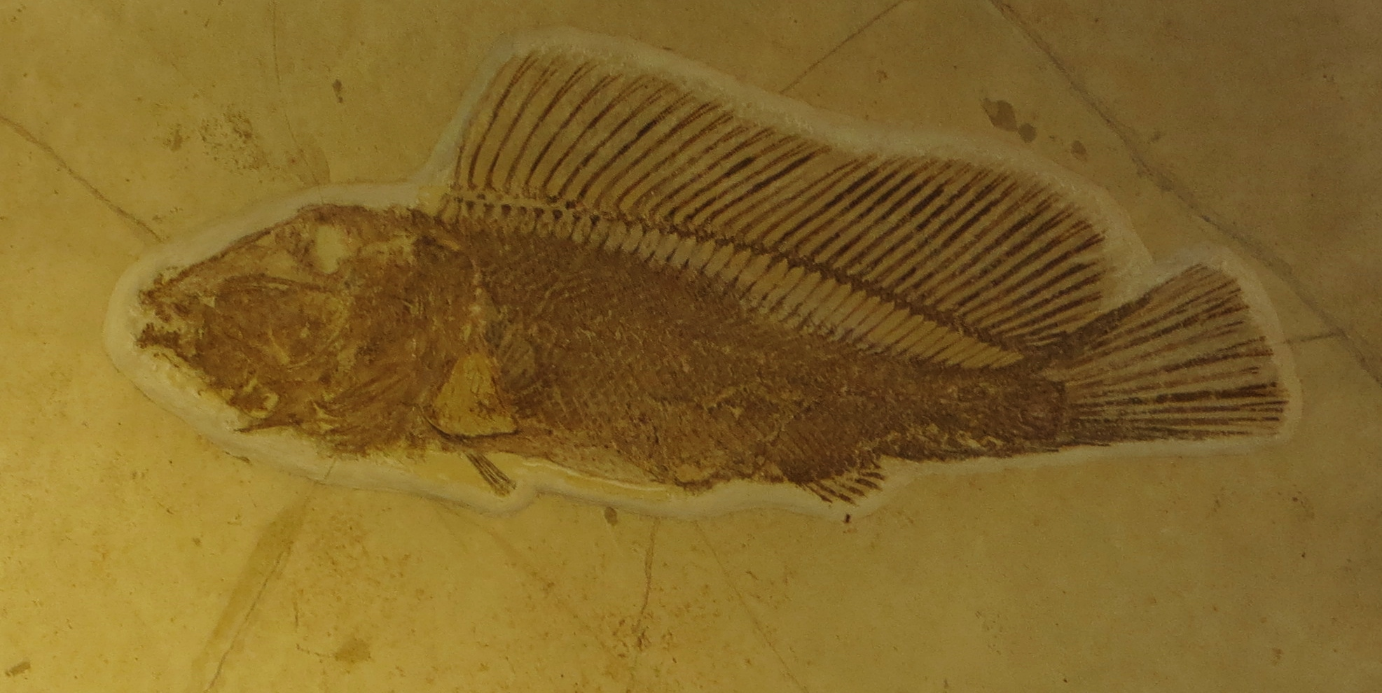 Fossil of Macrosemius - Took the picture at Natural History Museum, Bonn University